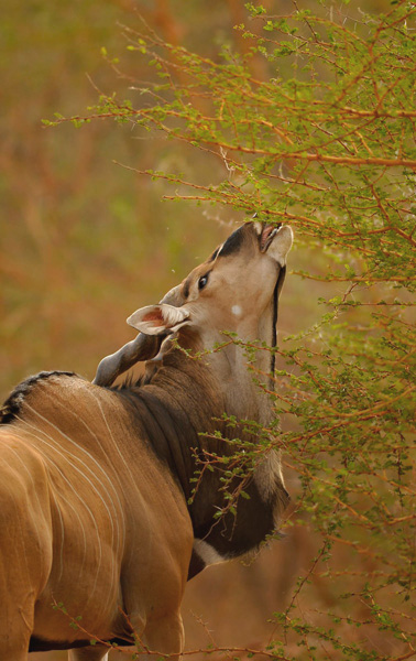 Antilopa Derbyho (Taurotragus derbianus derbianus)